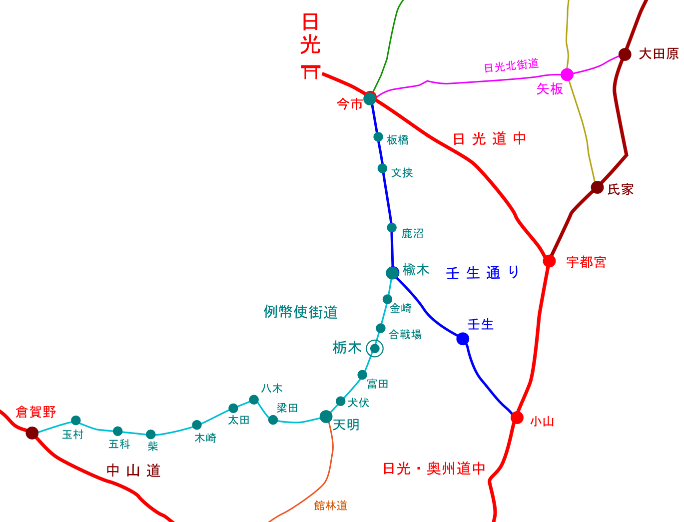 江戸時代、脇街道の一つ例幣使街道および栃木宿の位置（下野国、現・栃木県）。